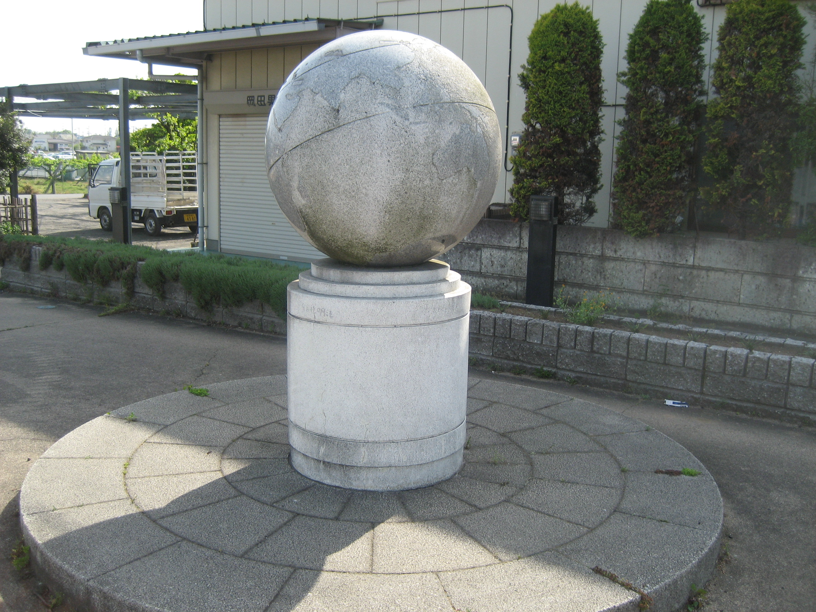 すきすきすぎーと３６モニュメント（北緯36度線に設置）